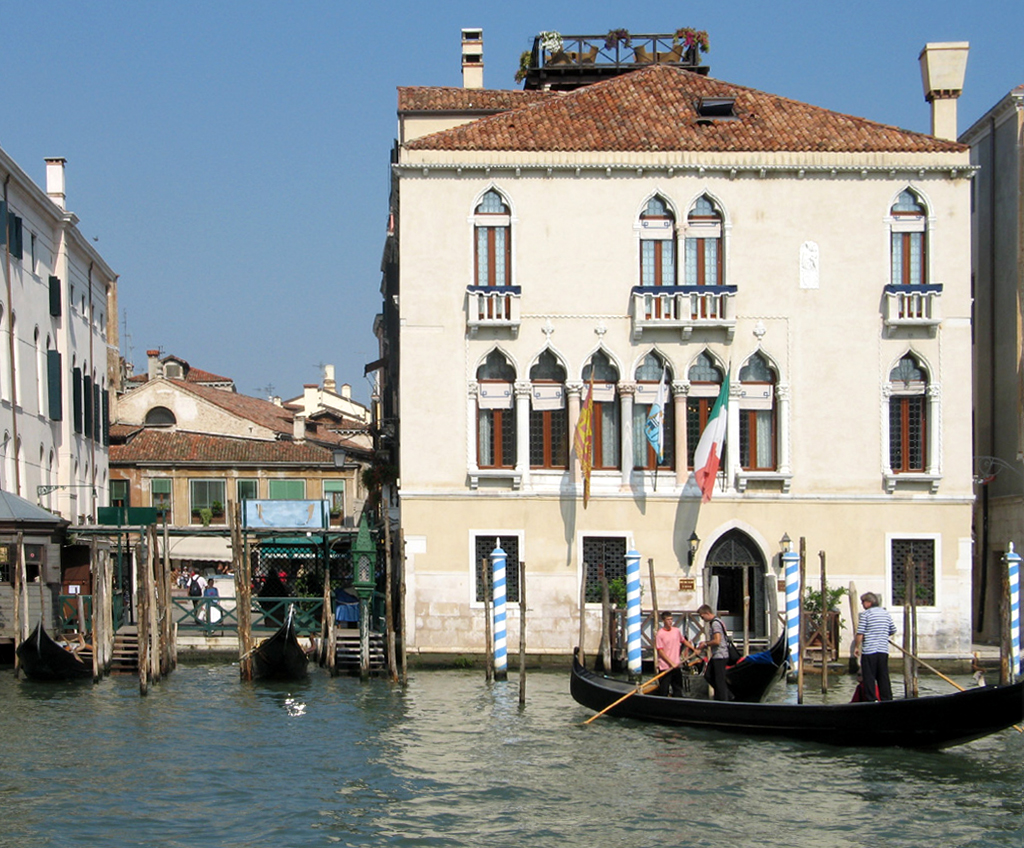 Venice - Palazzo Foscari a S. Sofia and a traghetto point close to the building